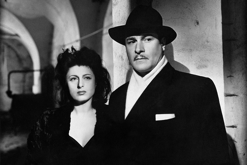 Una foto di scena del film Il bandito (1946) de Alberto Lattuada